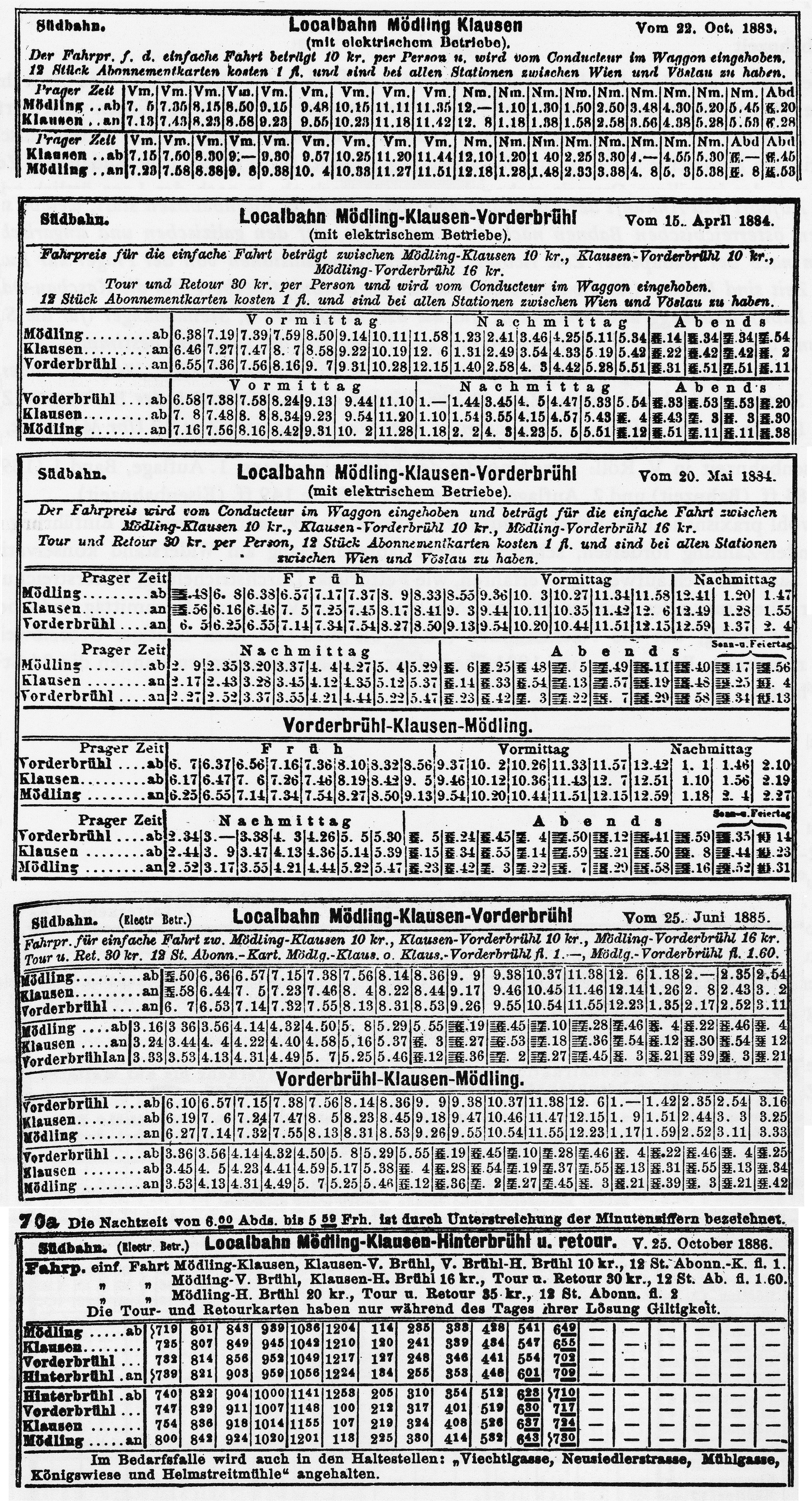 Lokalbahn Mödling–Hinterbrühl, Fahrpläne aus den ersten vier Bestandsjahren (1883-1886)